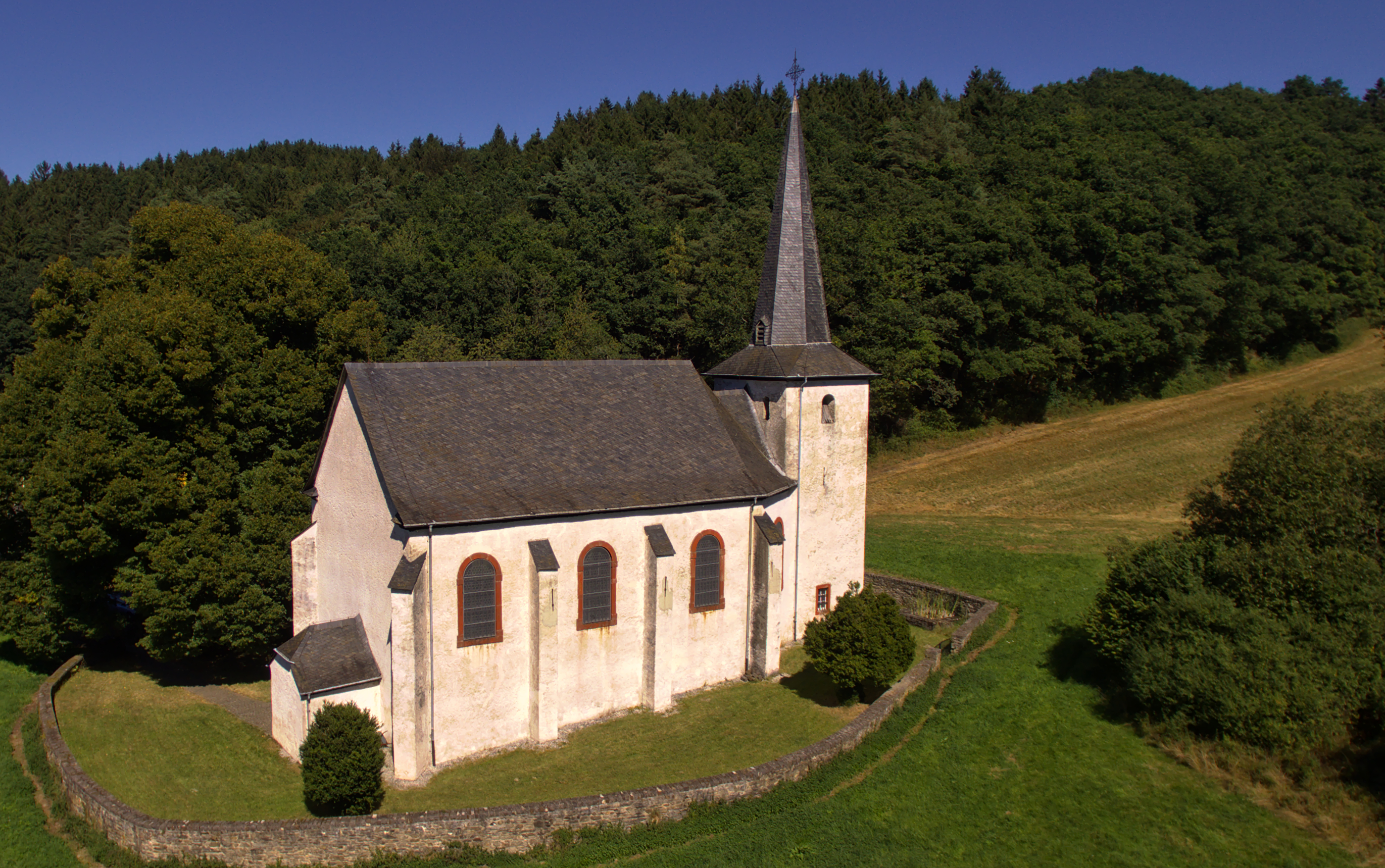 Die Walholzkirche bei Weiperath, Gemeinde Morbach, Rheinland-Pfalz von Süden. Eine alleine in den Wiesen stehende romanische Kirche.